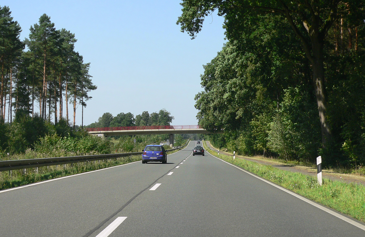 Grinderwald mit B 6 in Richtung Nienburg vor Schneeren Nord